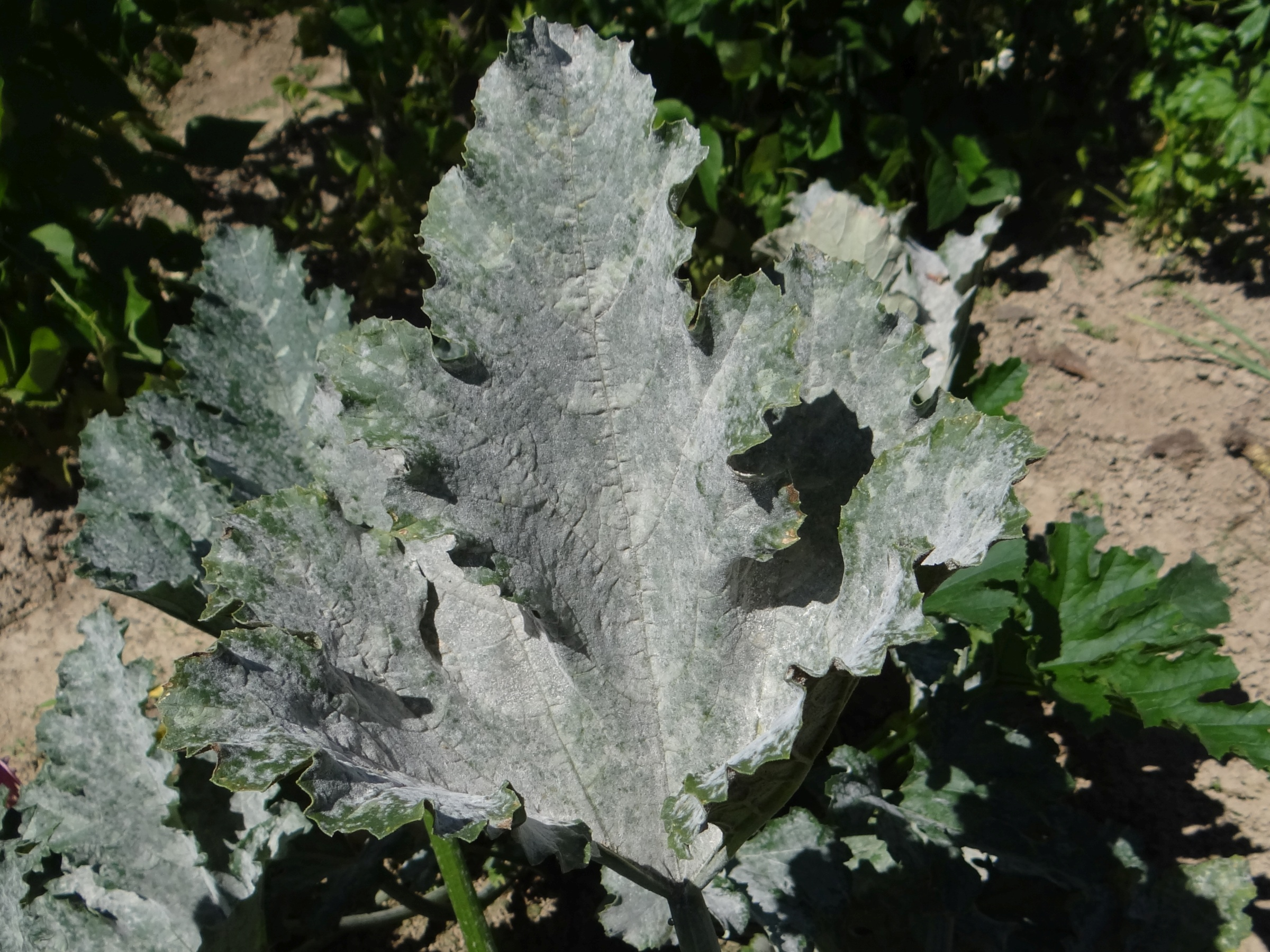 Podosphaera fusca on Cucurbita pepo var giromontiina